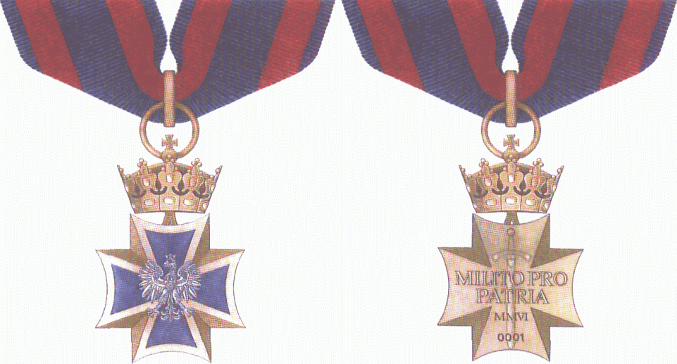 Krzyż Wielki Orderu Krzyża Wojskowego. Awers i rewers.